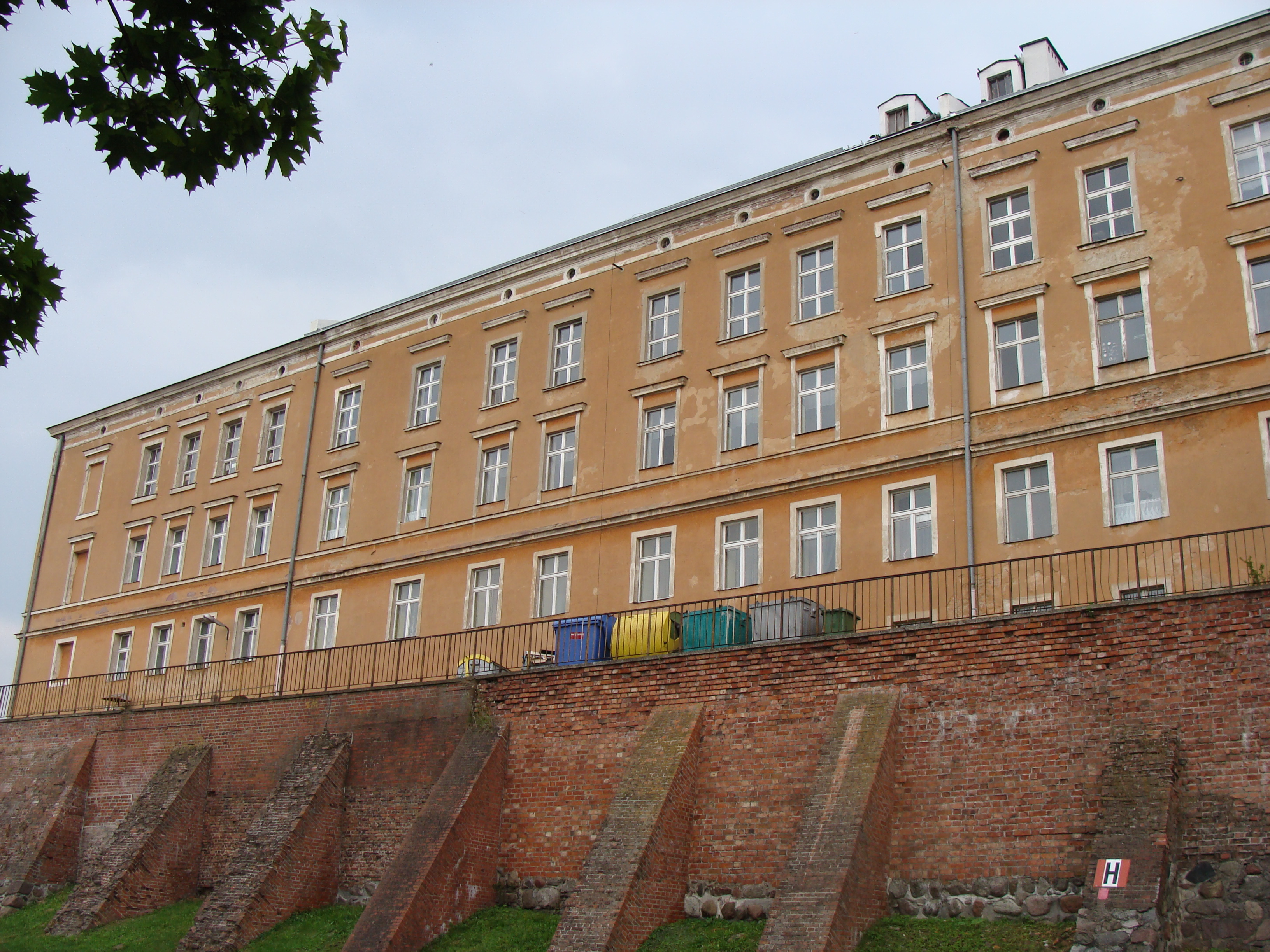 Kwidzyn, ul. Katedralna 5 - dawny Pałac Regencji (tzw. Pałac Fermora), obecnie budynek Zespołu Szkół Zawodowych nr 2, 1758, XIX/XX